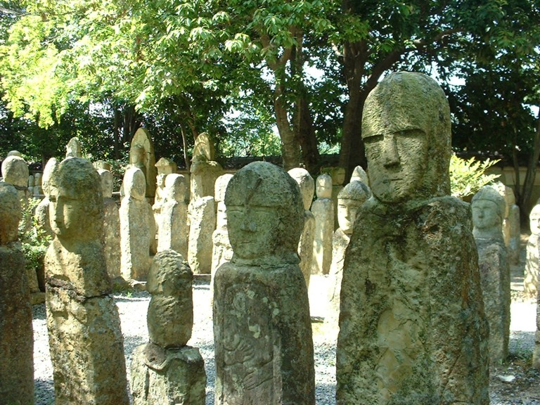 五百羅漢（兵庫県加西市、羅漢寺境内）